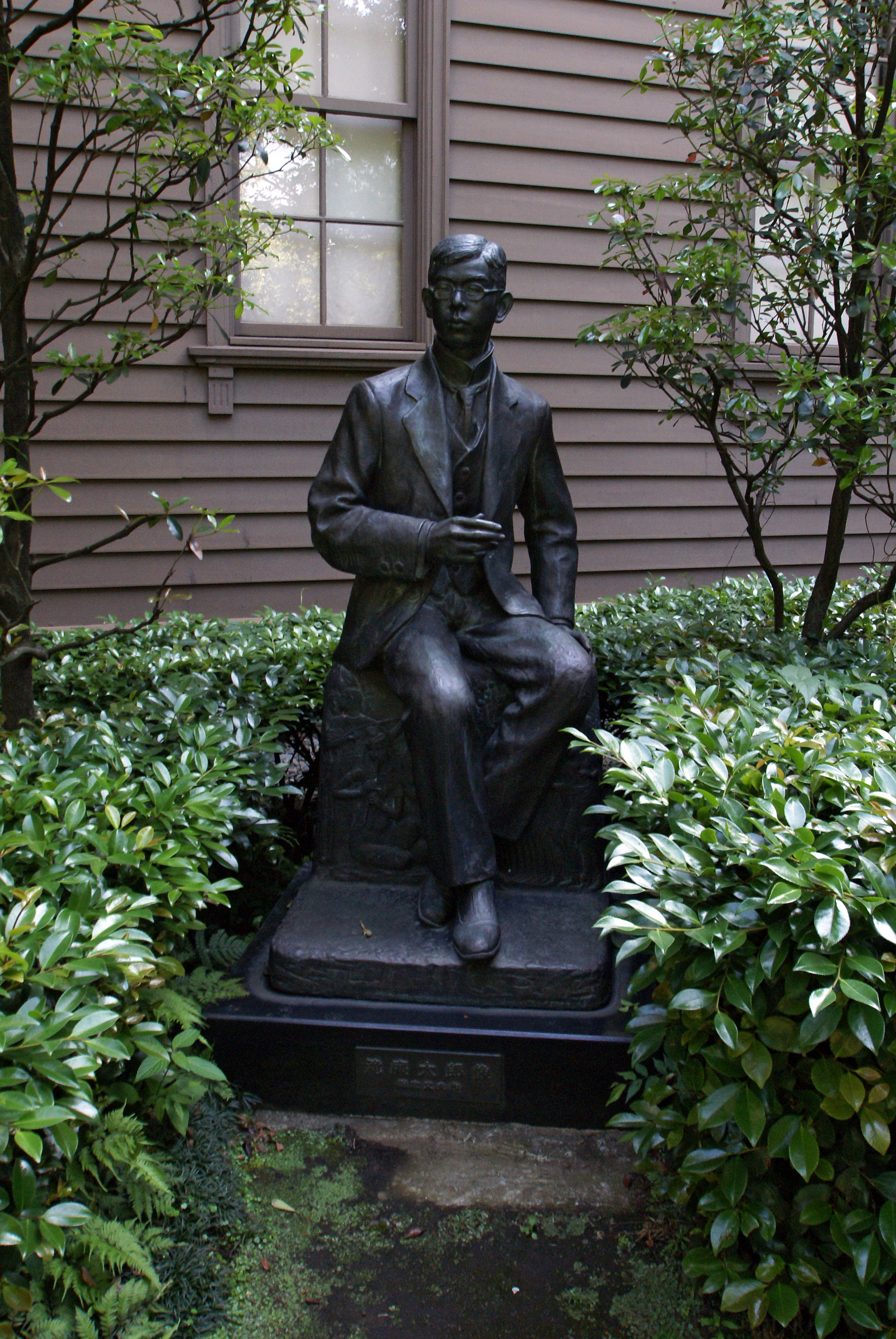 Sogakudo, Taito-ku, Tokyo, Japan